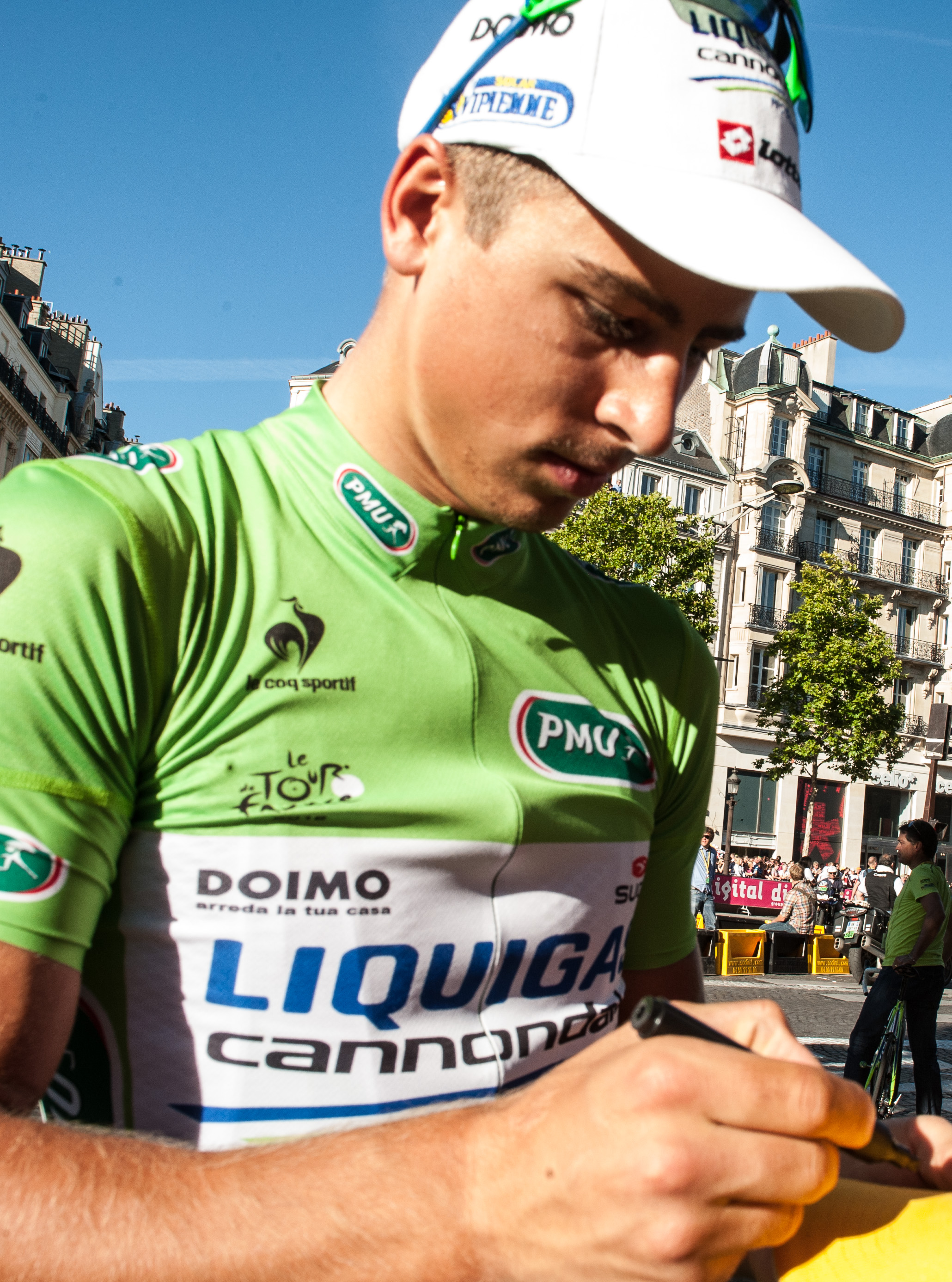 Peter Sagan - 2012 Tour de France